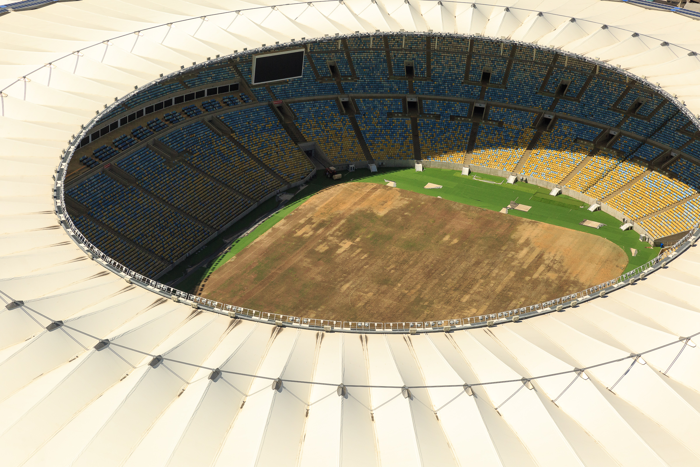 Vista aérea do estádio Maracanã com o gramado deteriorado, após os Jogos Olímpicos, localizado na cidade do Rio de Janeiro.